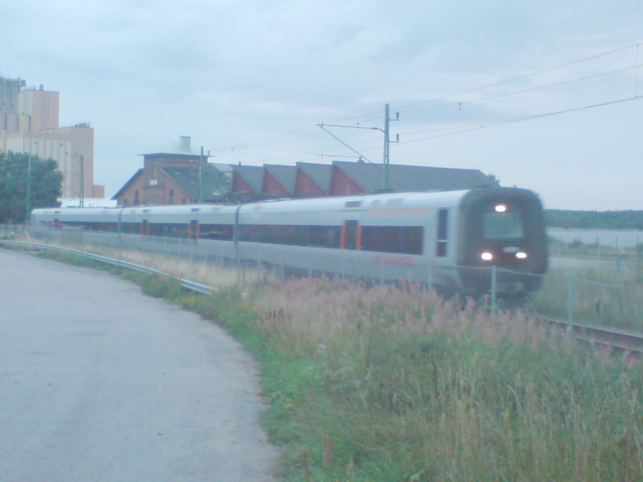 Öresundståg på väg mot Köpenhamn(-Helsingör) har precis lämnat Sölvesborgs station